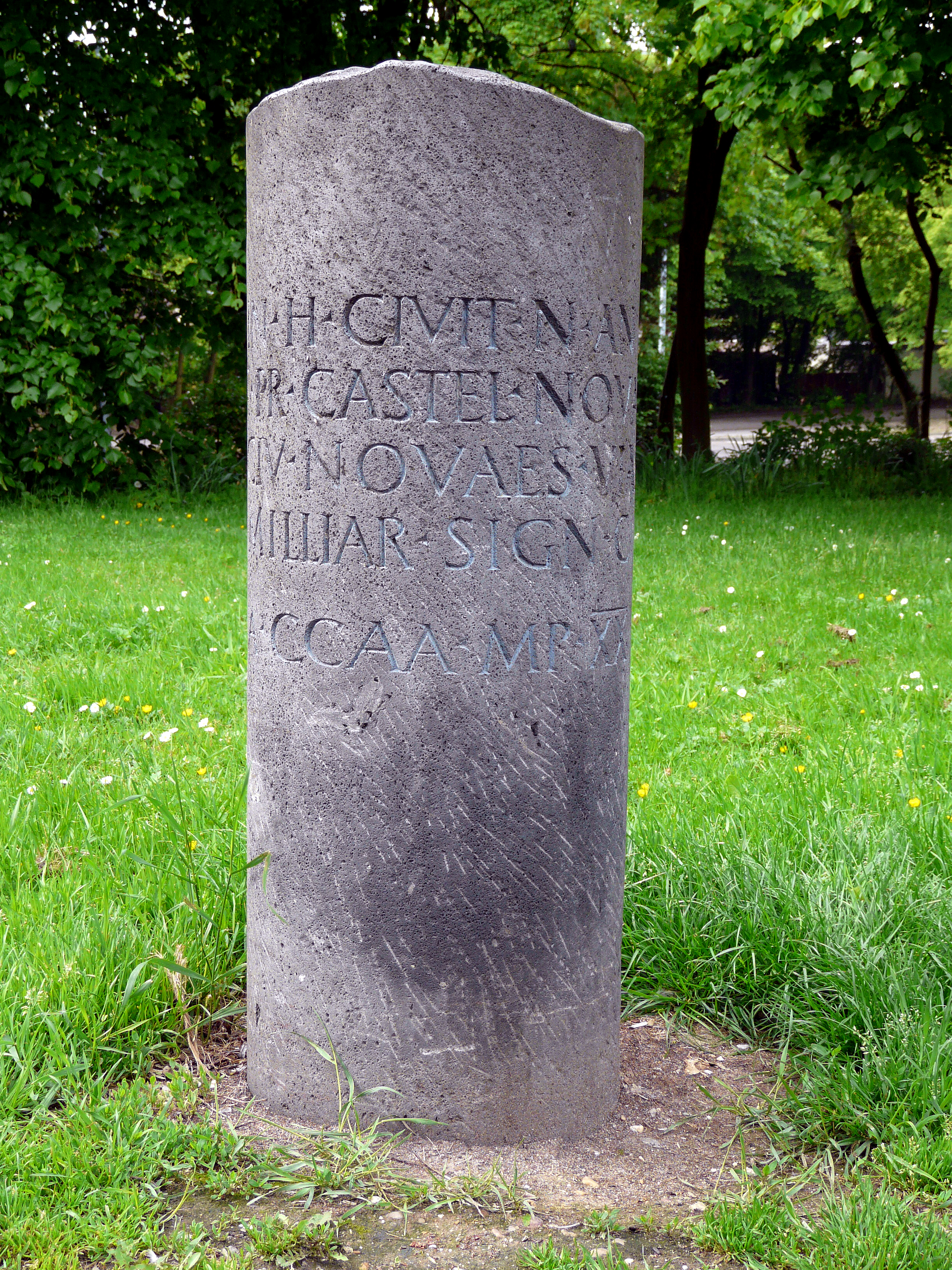 Theoretisch Nachbildung eines Meilensteins bei Novaesium; Historischer Rundgang, Neuss